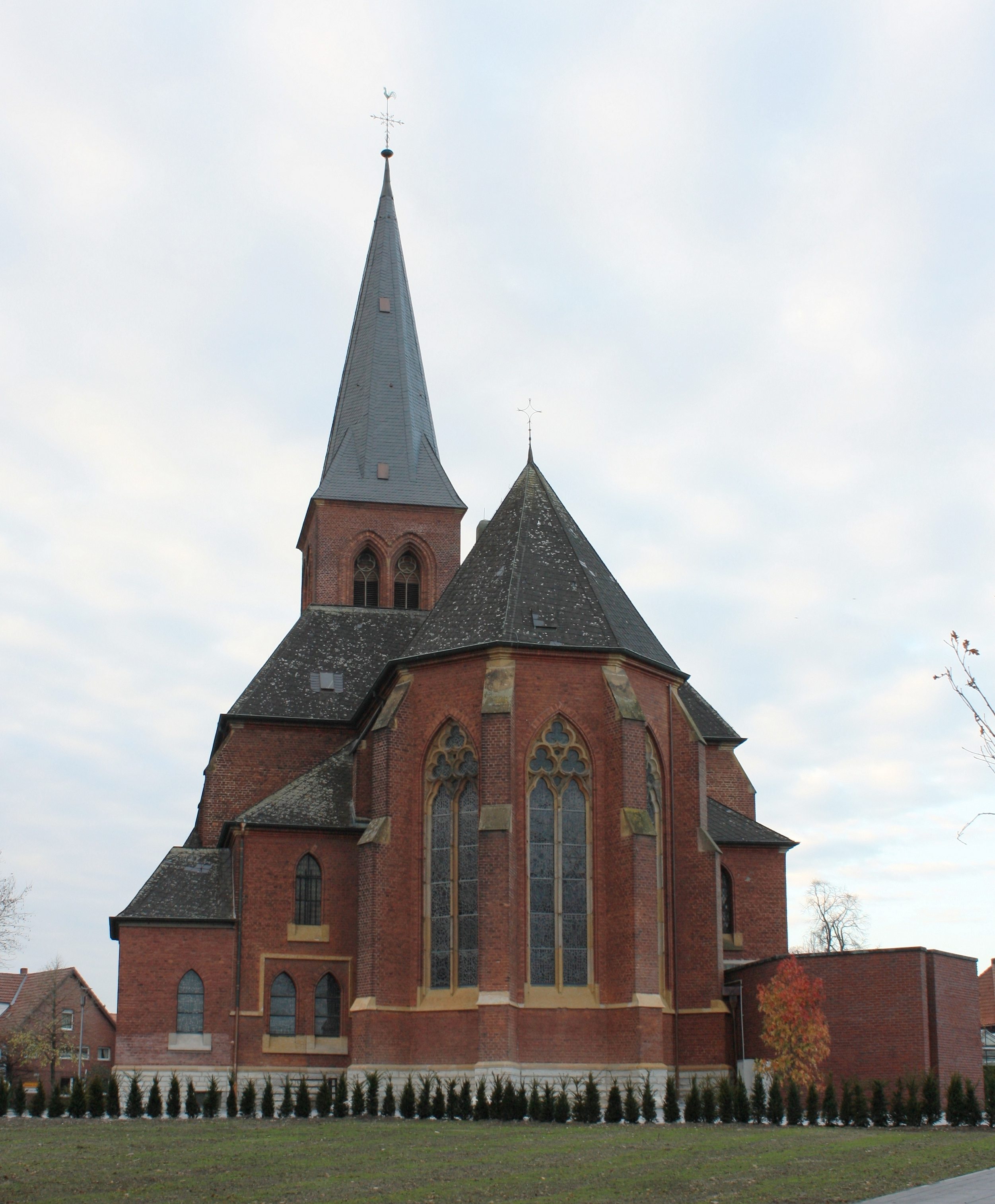 Katholische Kirche St. Laurentius in Ennigerloh-Westkirchen, von Osten